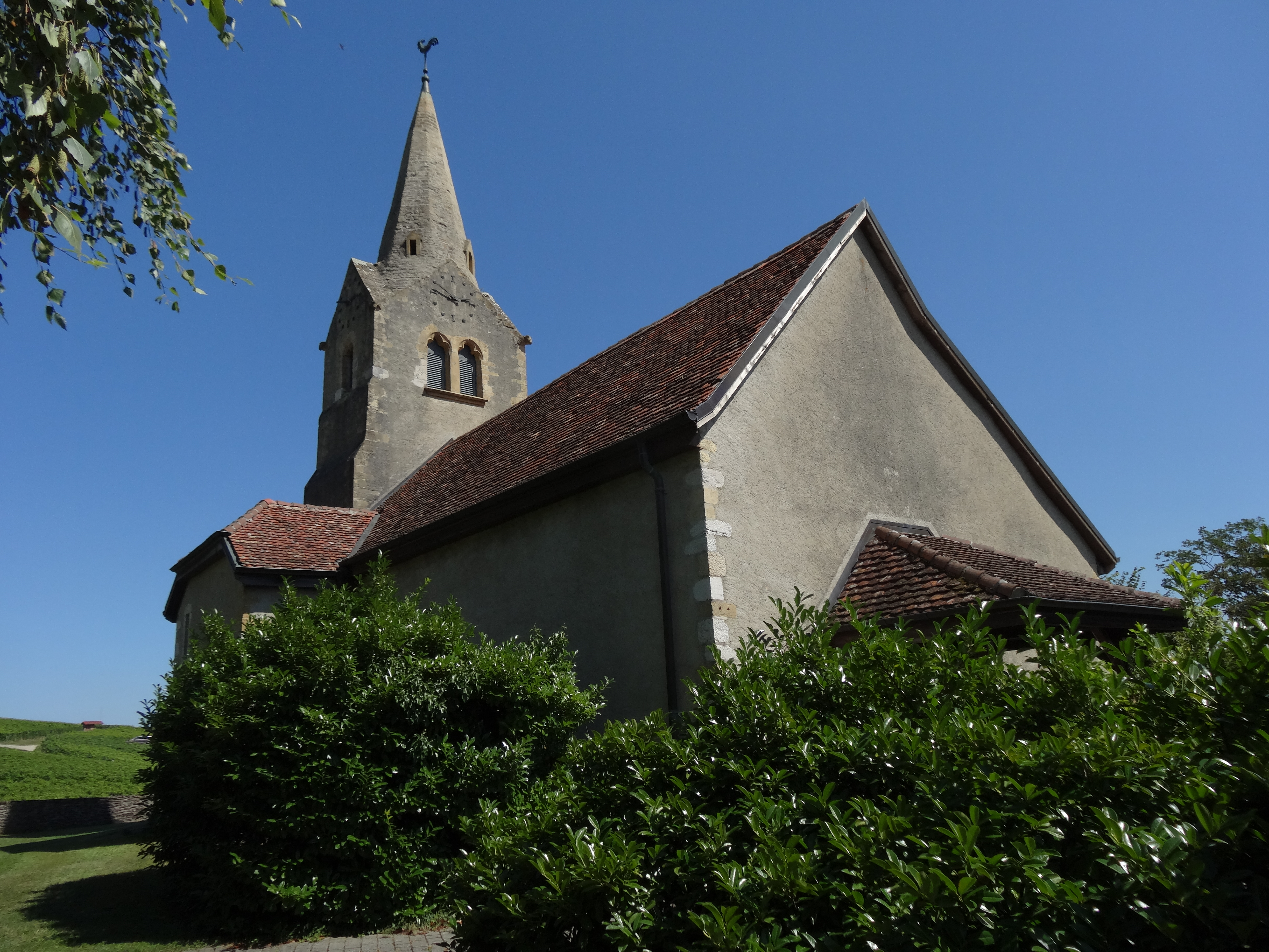 Bonvillars, Le temple